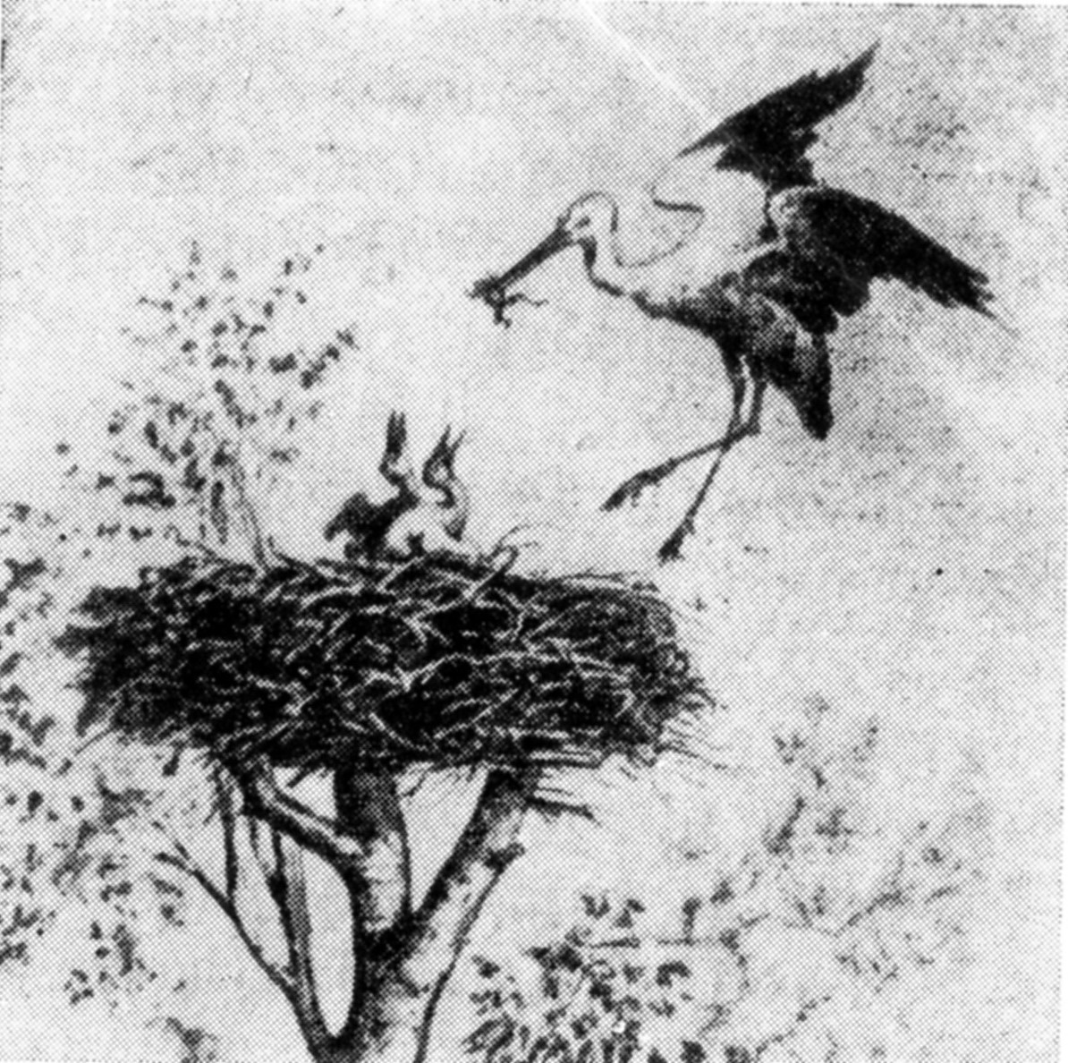 Беларуская (тарашкевіца): Малюнак беларускага паэта і празаіка Каруся Каганца (Казімера Кастравіцкага) «Буслы» (туш)